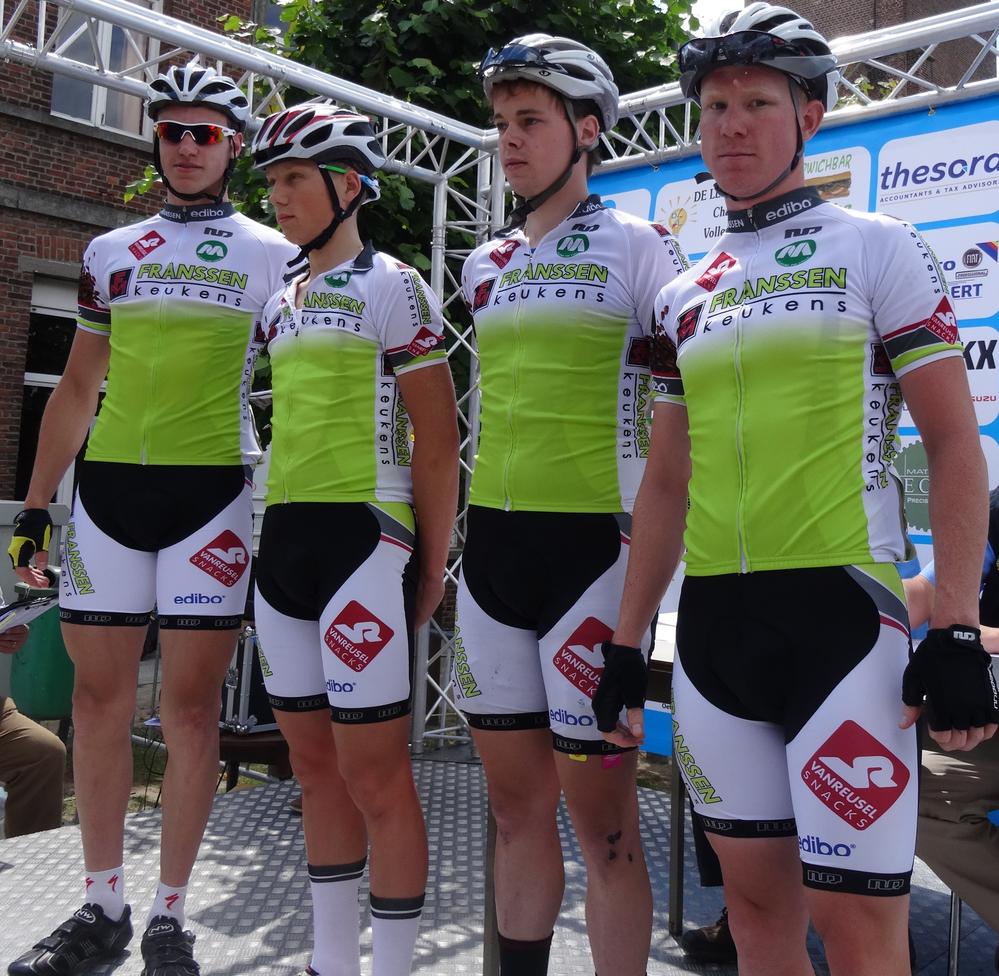 Reportage photographique réalisé le mercredi 25 juin à l'occasion du départ et de l'arrivée de l'Internationale Wielertrofee Jong Maar Moedig 2014 à Oetingen (Gooik), Belgique.